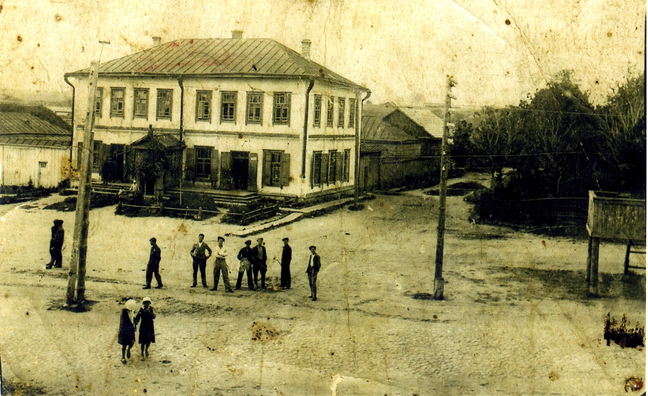 Беларуская (тарашкевіца): Копысь (Kopyś), пляц Рынак (plac Rynak)